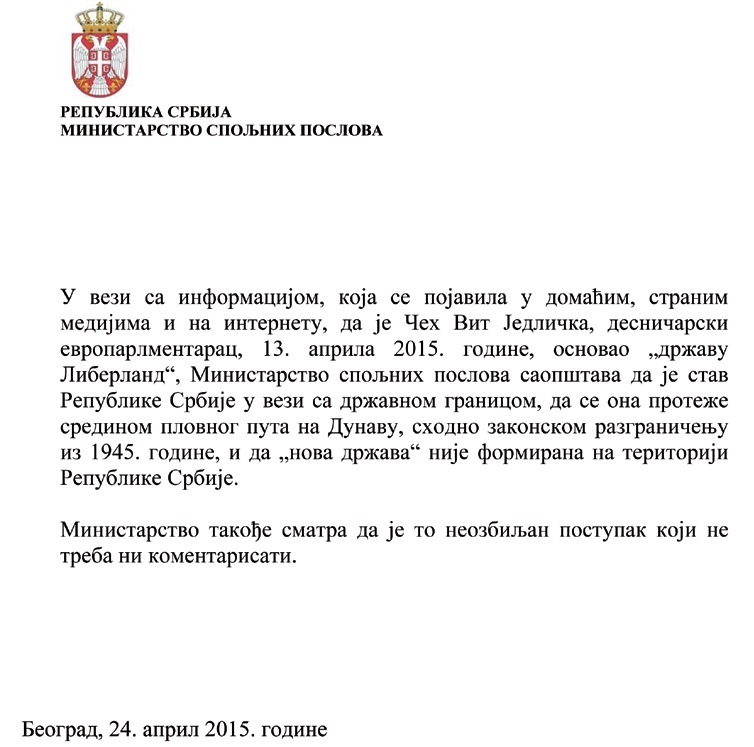 Званична изјава МИП Србије о оснивању Либерланда